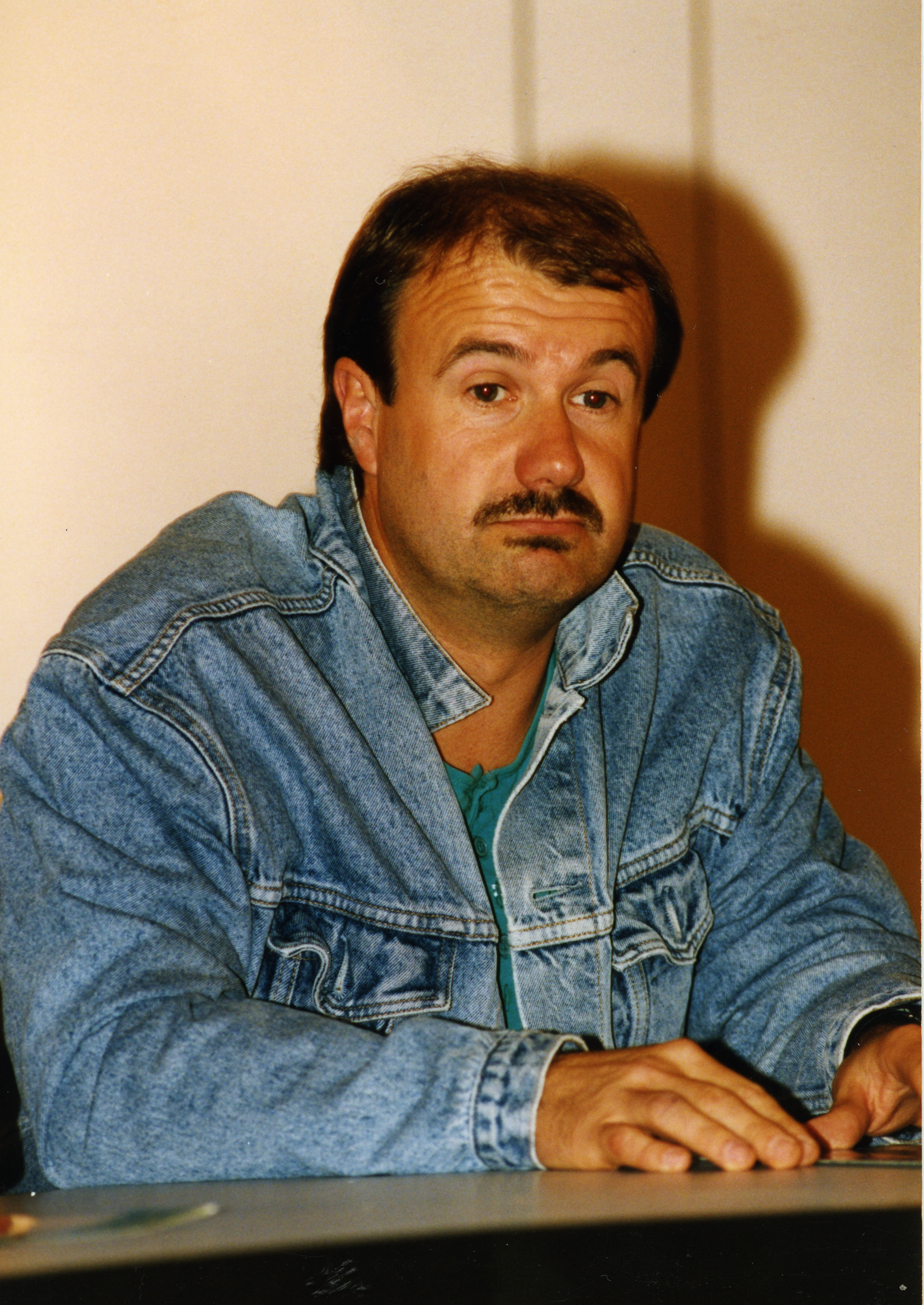 Euskal musikari buruzko mahai-ingurua. Aiurri 3. zbk 30. orr.